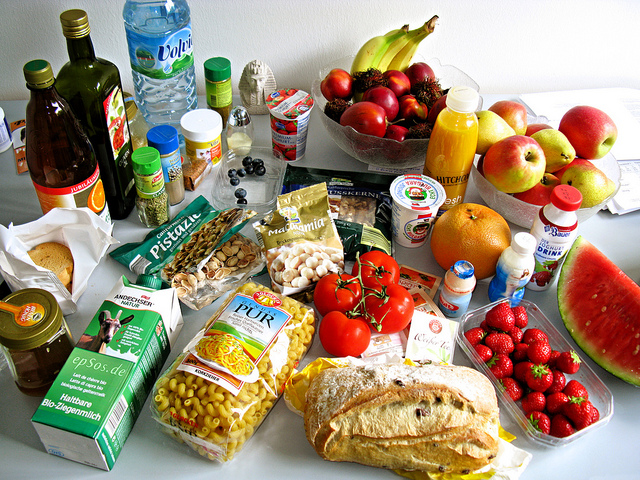 Varios alimentos y bebidas